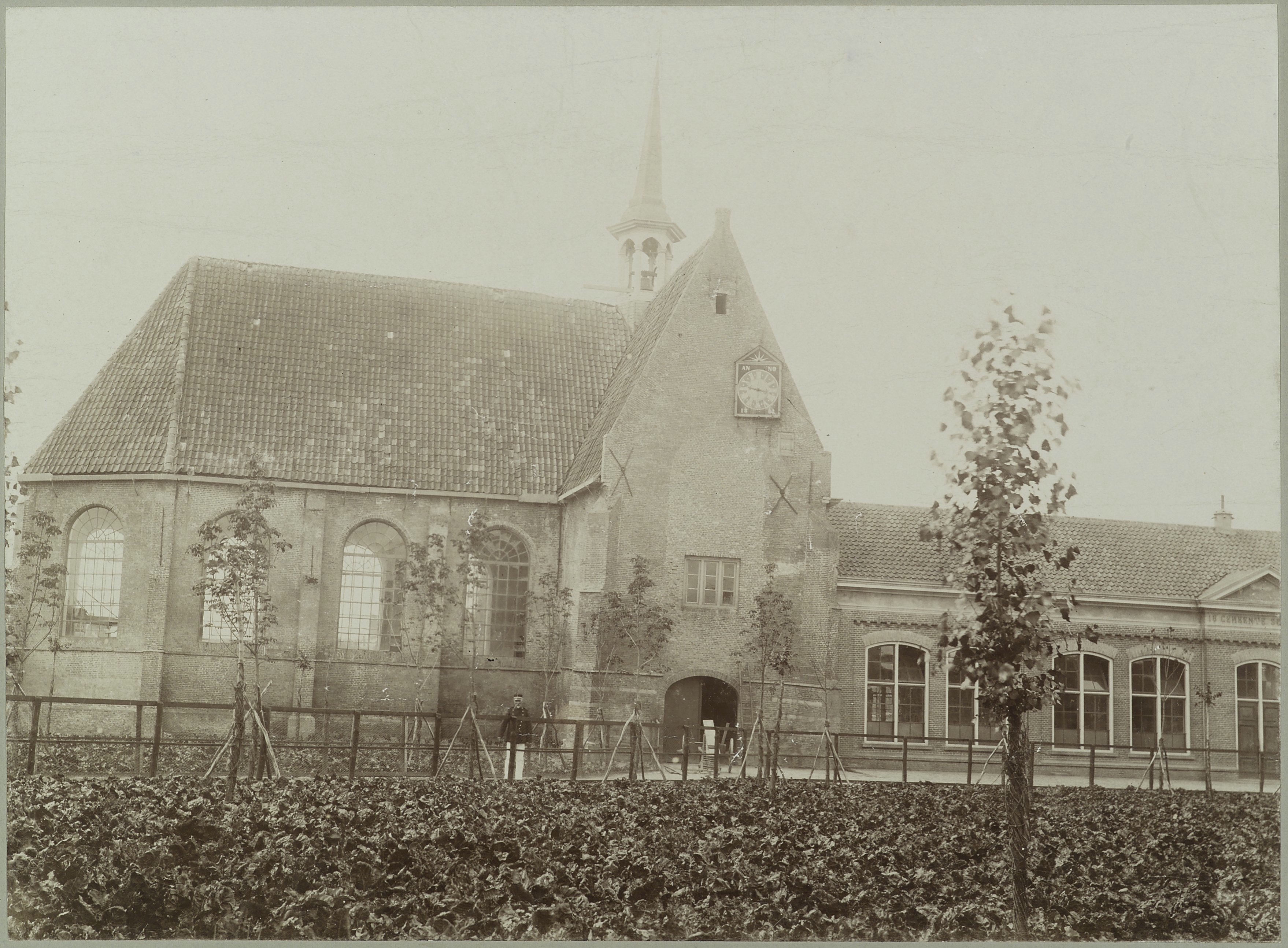 Nederlands Hervormde Kerk: Overzicht hervormde kerk noordzijde (opmerking: Bureau Mulder) - Sint Annaland, Ring 1 - Sint Anna (16e - 1898) - afgebroken in 1898